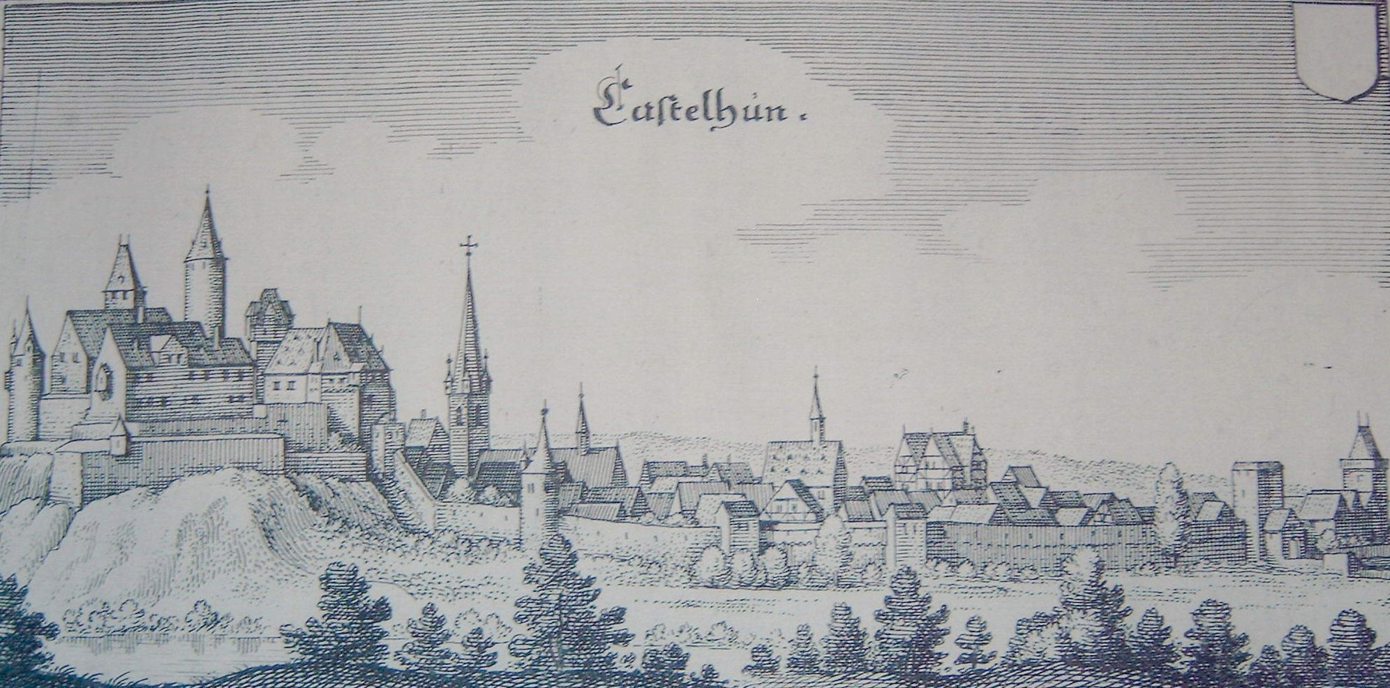 Kastellaun im Hunsrück mit Burg und Kirchen, Merian 1645